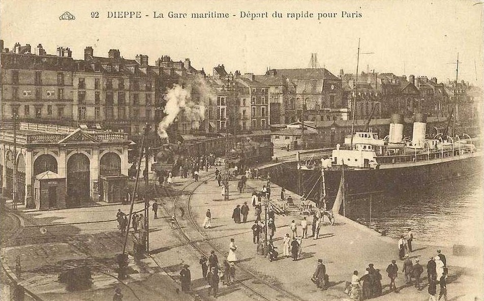 l’entrée de la gare de Dieppe-Maritime devant la poissonnerie.